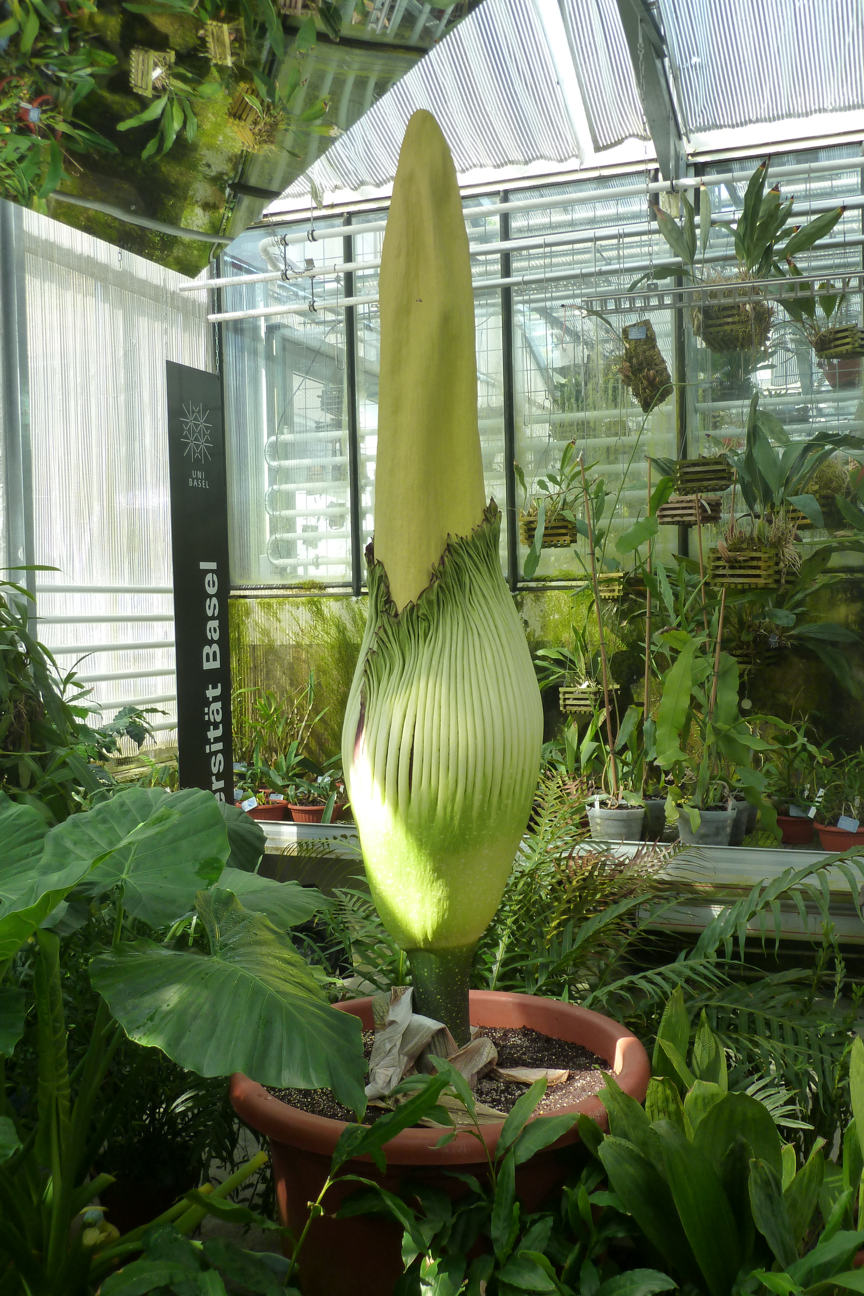 Titanwurz im Botanischen Garten der Universität Basel am Spalentor; 22. April 2011 (Karfreitag). Die Blume hat sich noch nicht geöffnet.